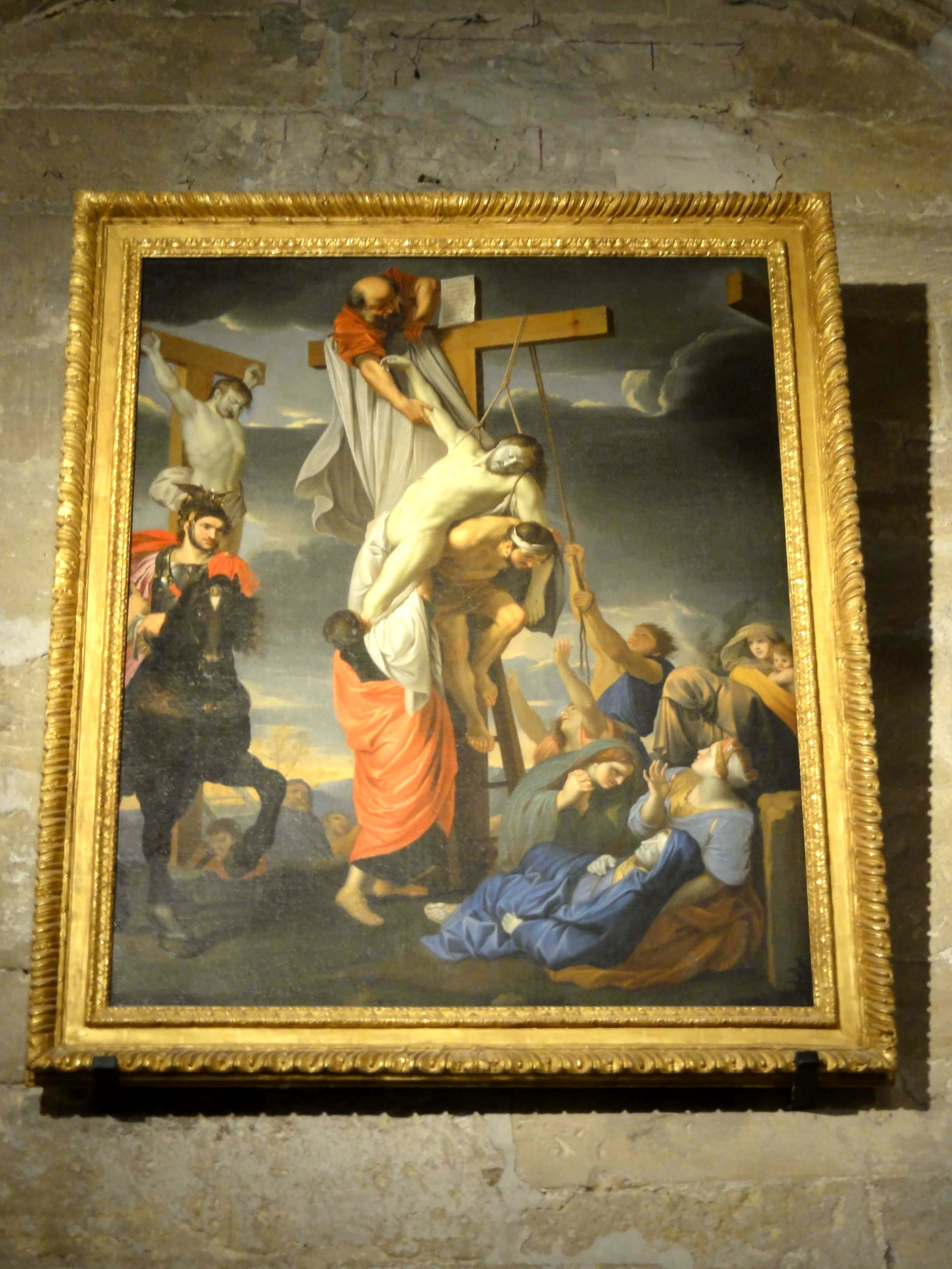 Mobilier de l'église - voir titre.